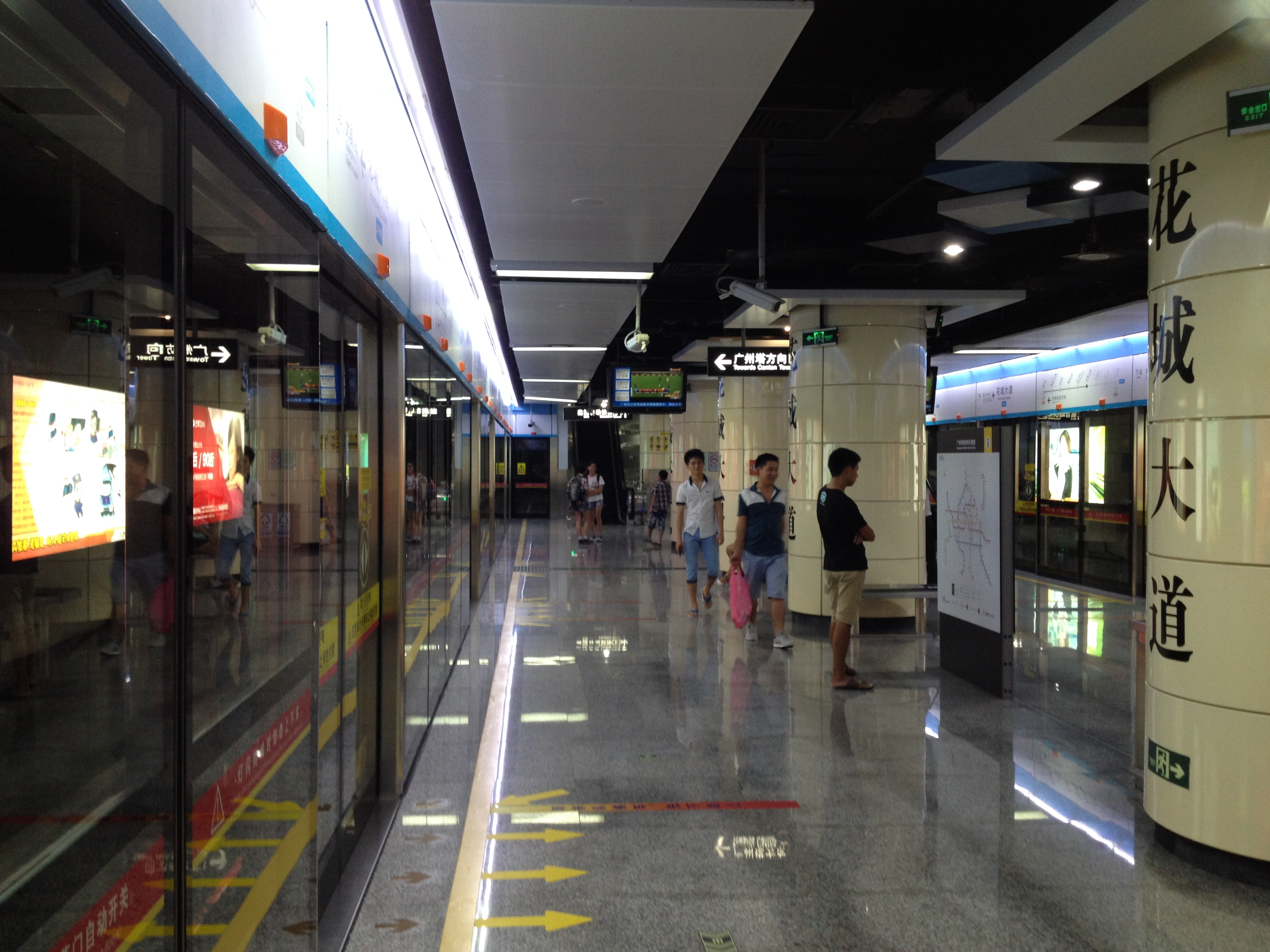 广州地铁花城大道站月台